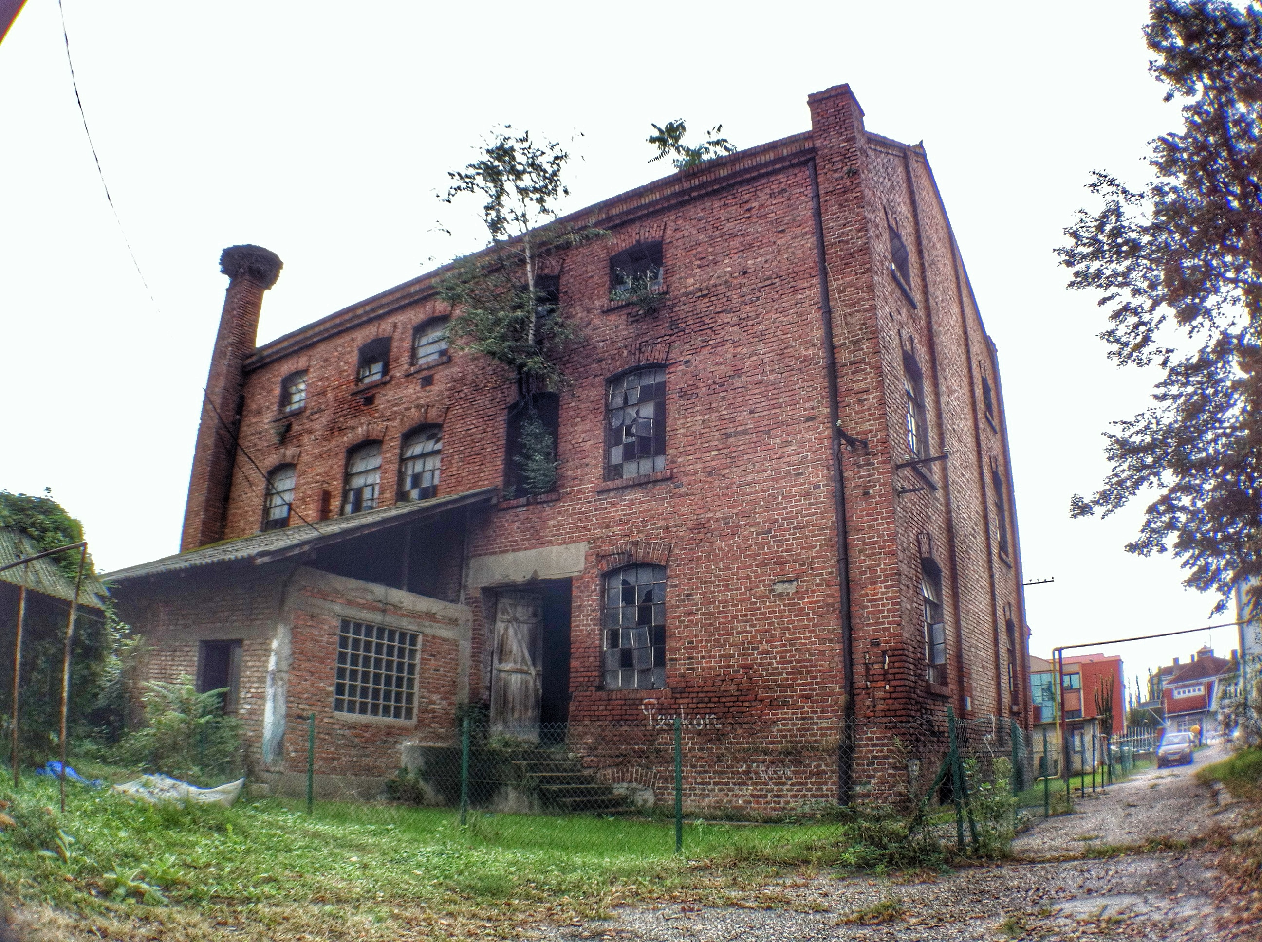 Српски (ћирилица): Налази се поред Општине у Великој Плани.